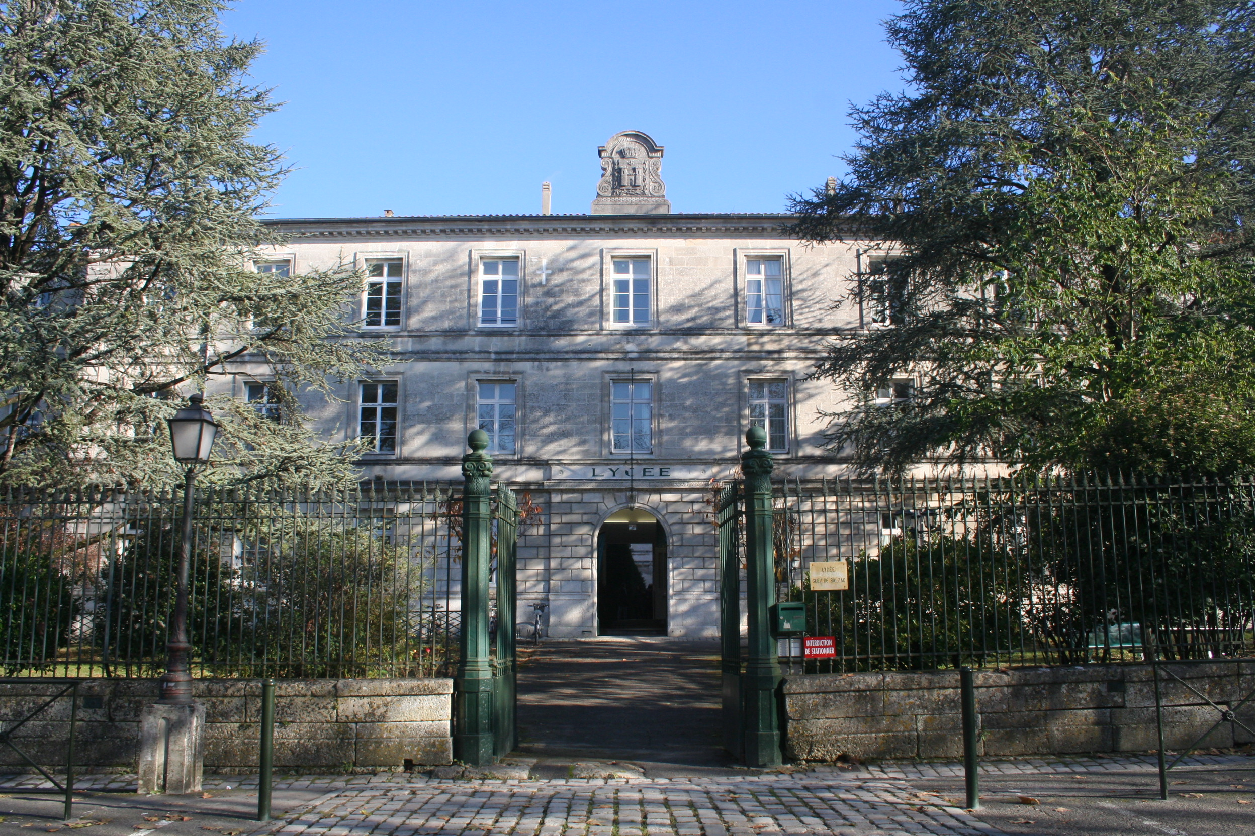 Entrée principale du lycée Guez de Balzac d'Angoulême